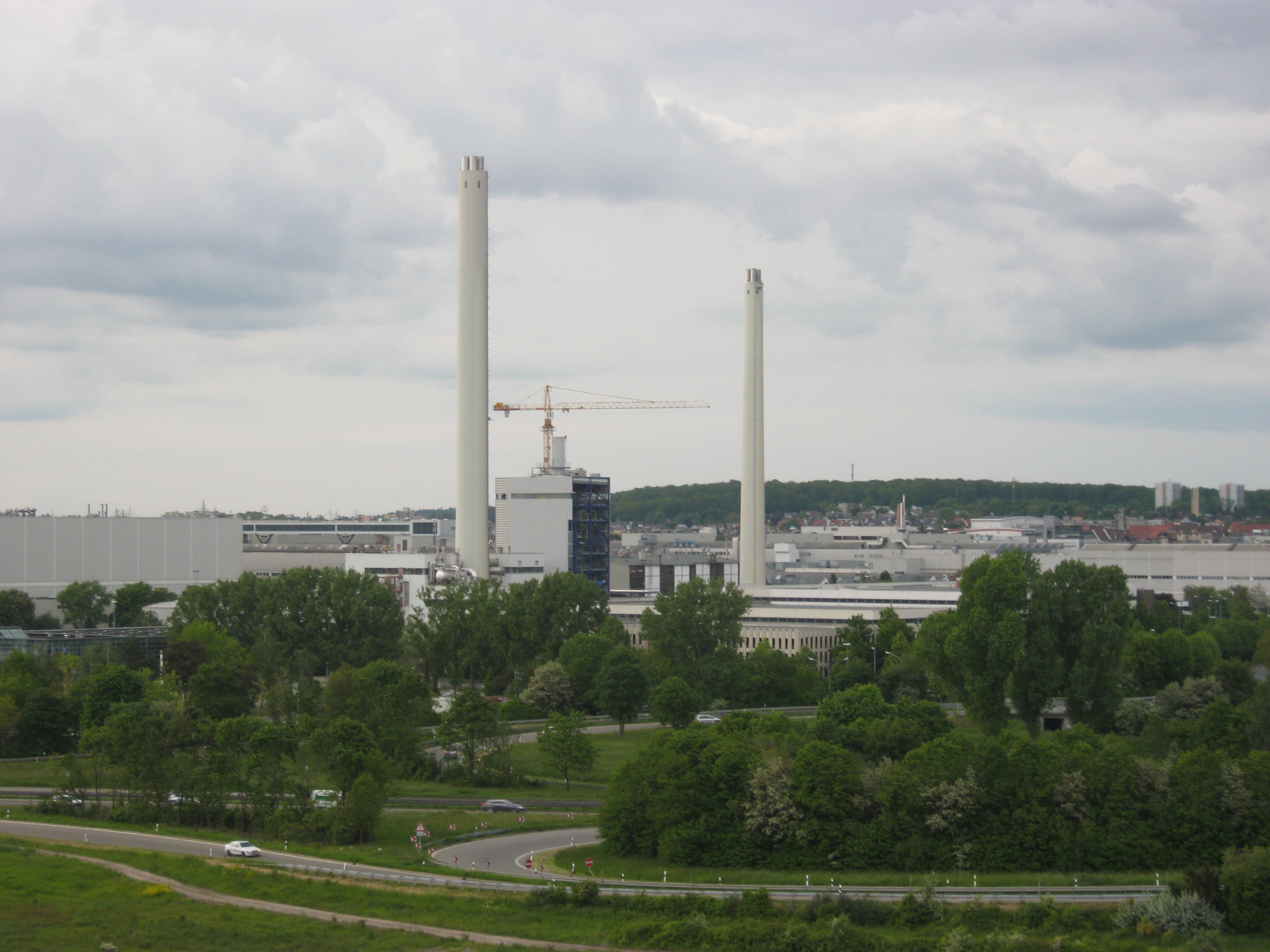 Blick vom Riesenrad auf dem Böblinger Frühlingsfest 2013 zum Daimler-Heizkraftwerk